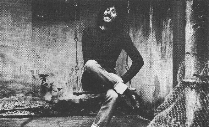 Fotografía del músico uruguayo Jaime Roos